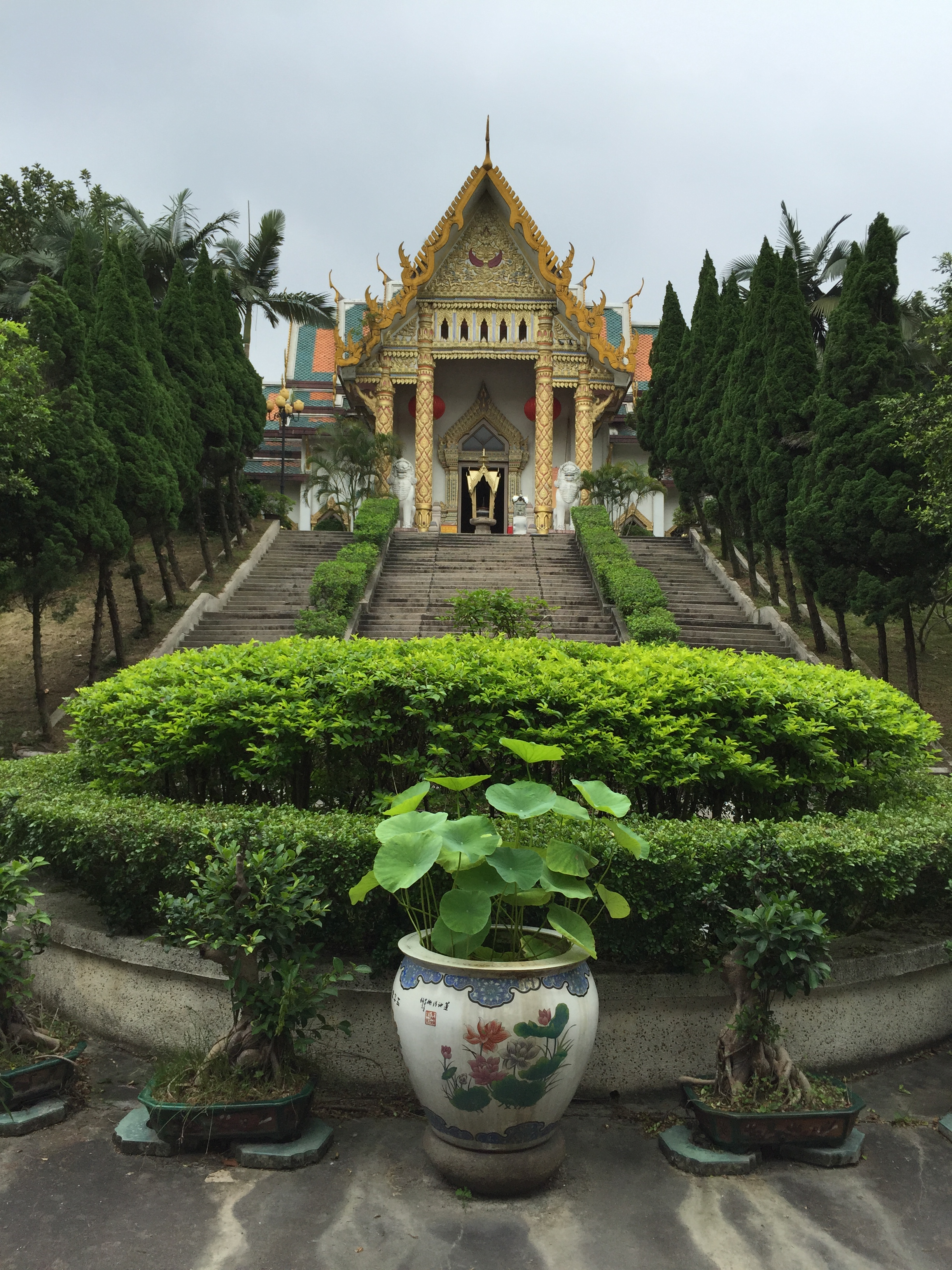 中文（中国大陆）: 潮州开元寺泰佛殿